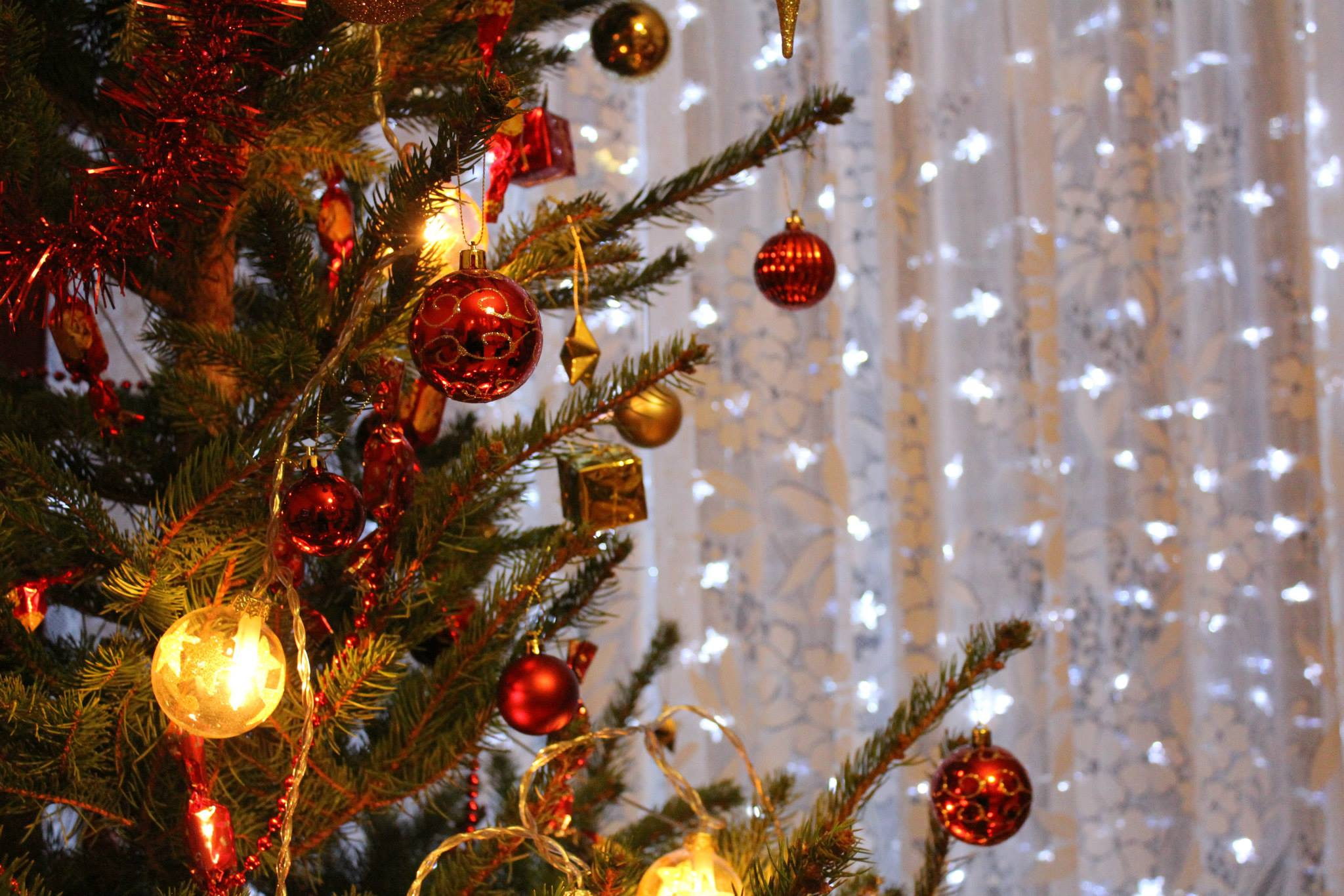 Szaloncukroktól terhes hagyományosan feldíszített magyar karácsonyfa 2014. december 24-én